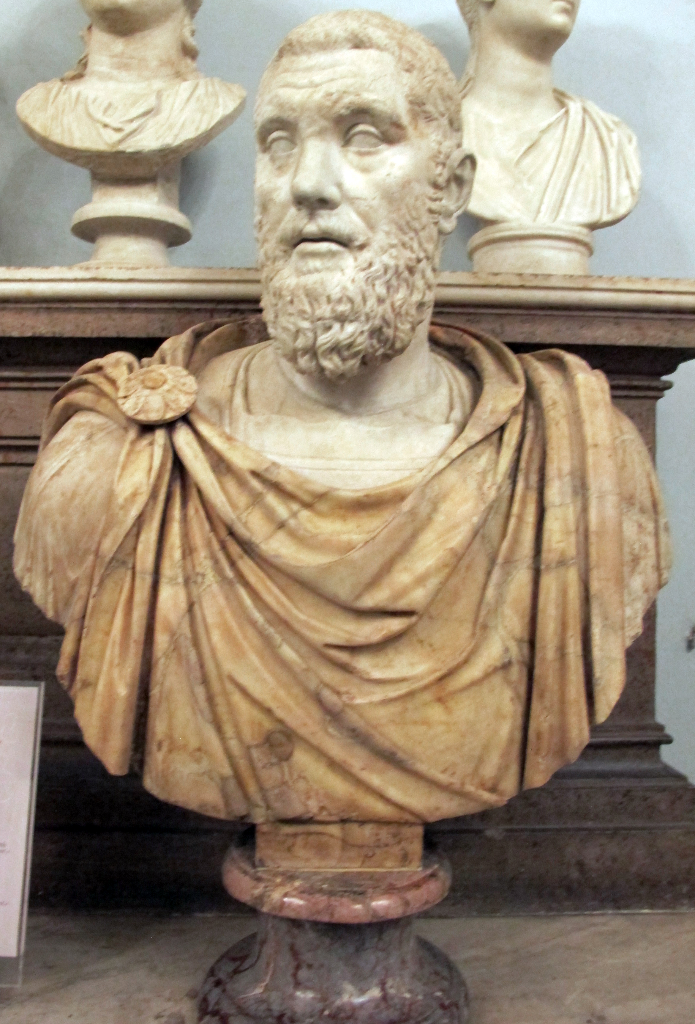 Musei Capitolini